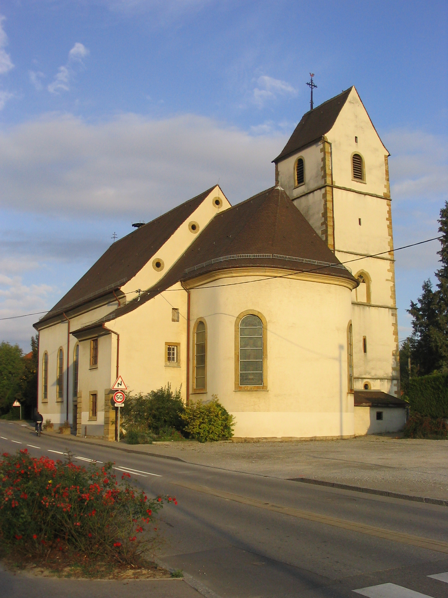 Église de Zimmersheim, façade sud est, clocher en bâtière.